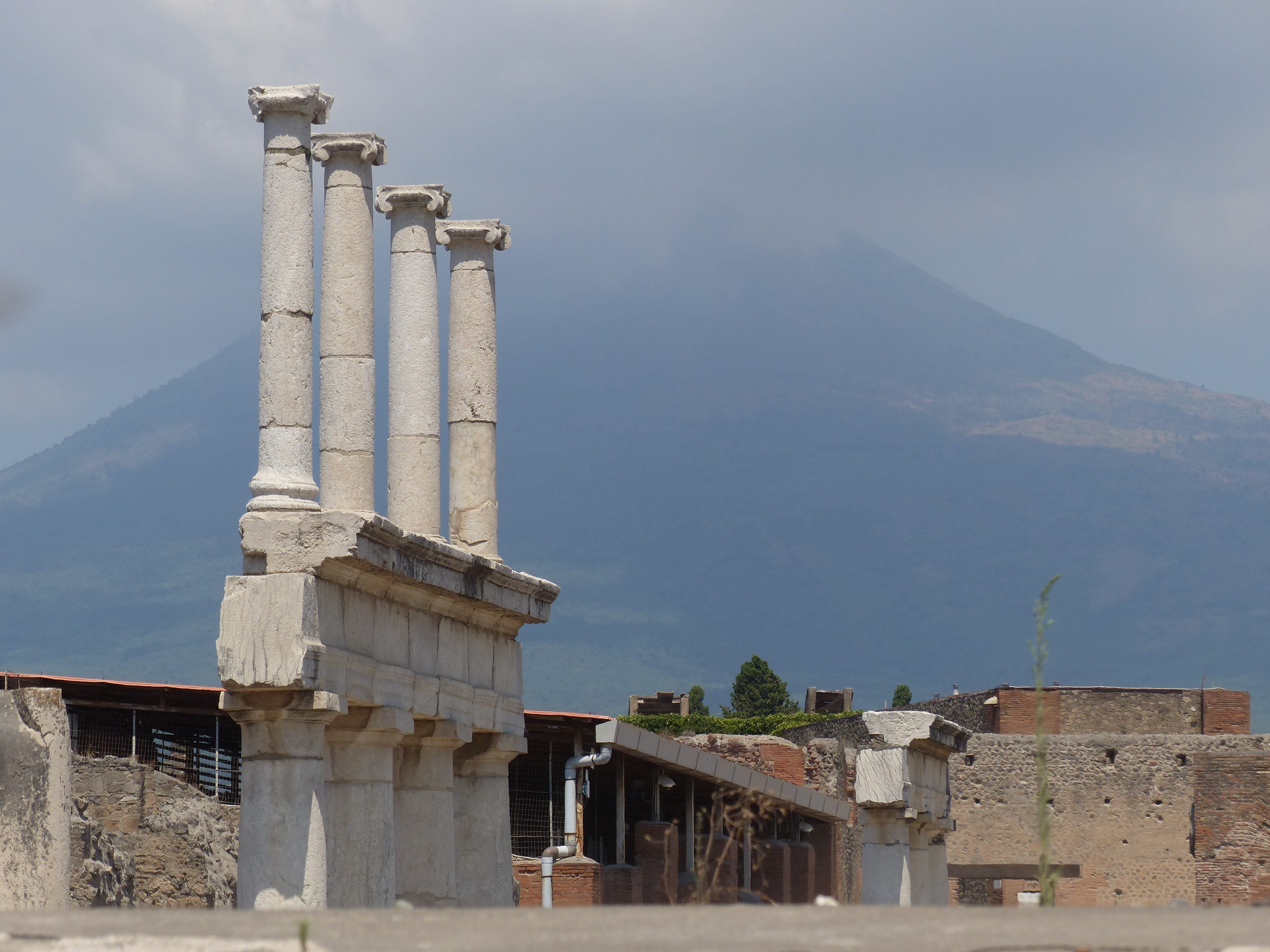 Foro de Pompeya